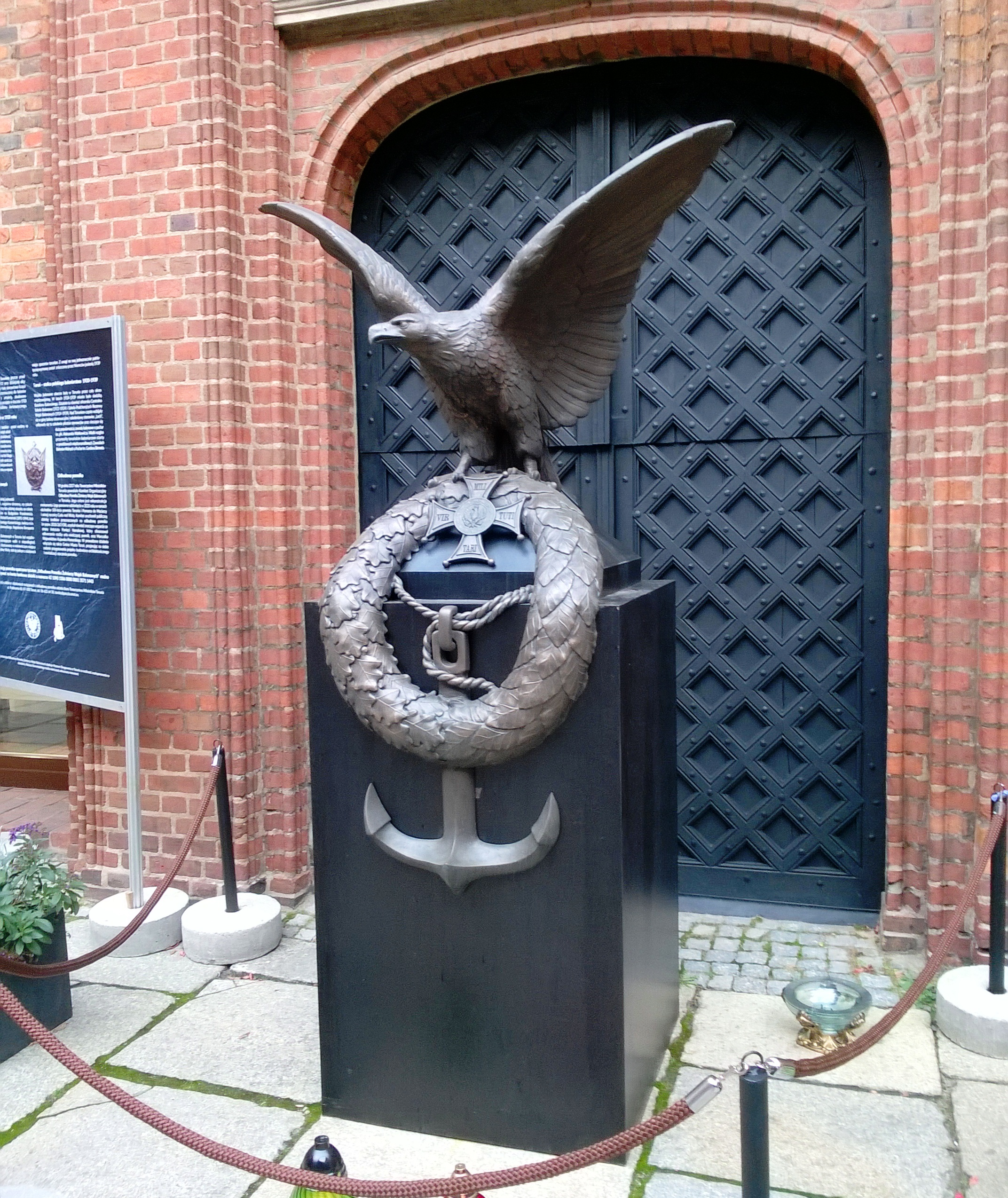 Replika orła z Pomnika Żołnierzy Wojsk Balonowych w Toruniu, 2019